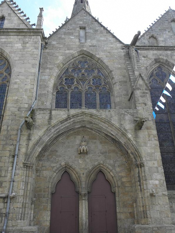 Portail Sainte-Jeanne, au transept nord de la basilique Notre-Dame de Bon-Secours de Guingamp (22). .